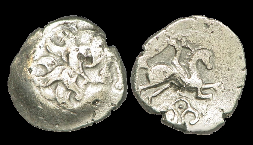 Drachme en argent du trésor Gaulois d'Ouzilly. Drachme n° 128 du trésor. Tribus des Pictons.